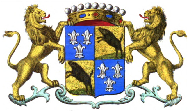 Armoiries de la famille Borrekens